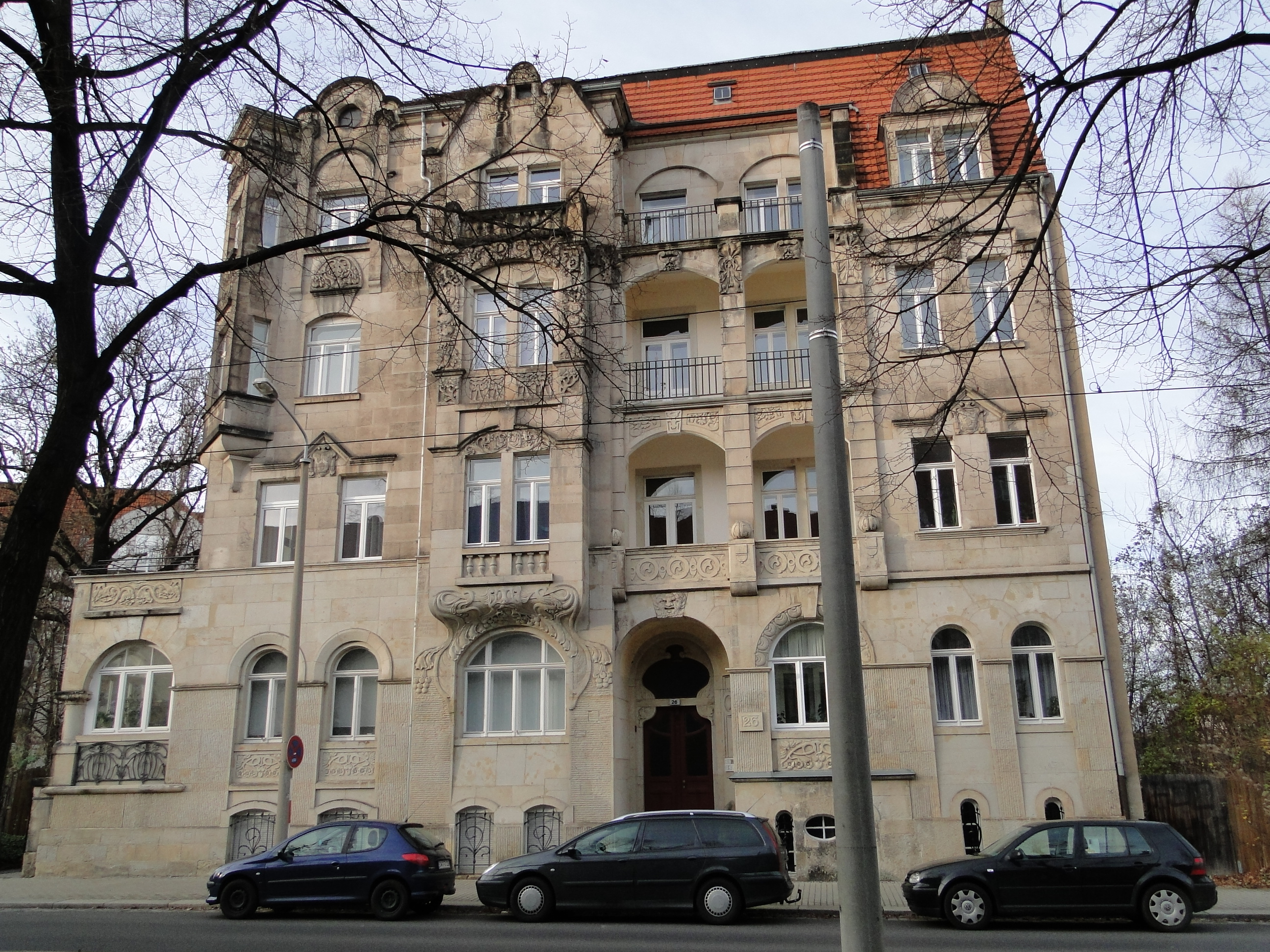 Haus Münchner Straße 26 in Dresden-Südvorstadt